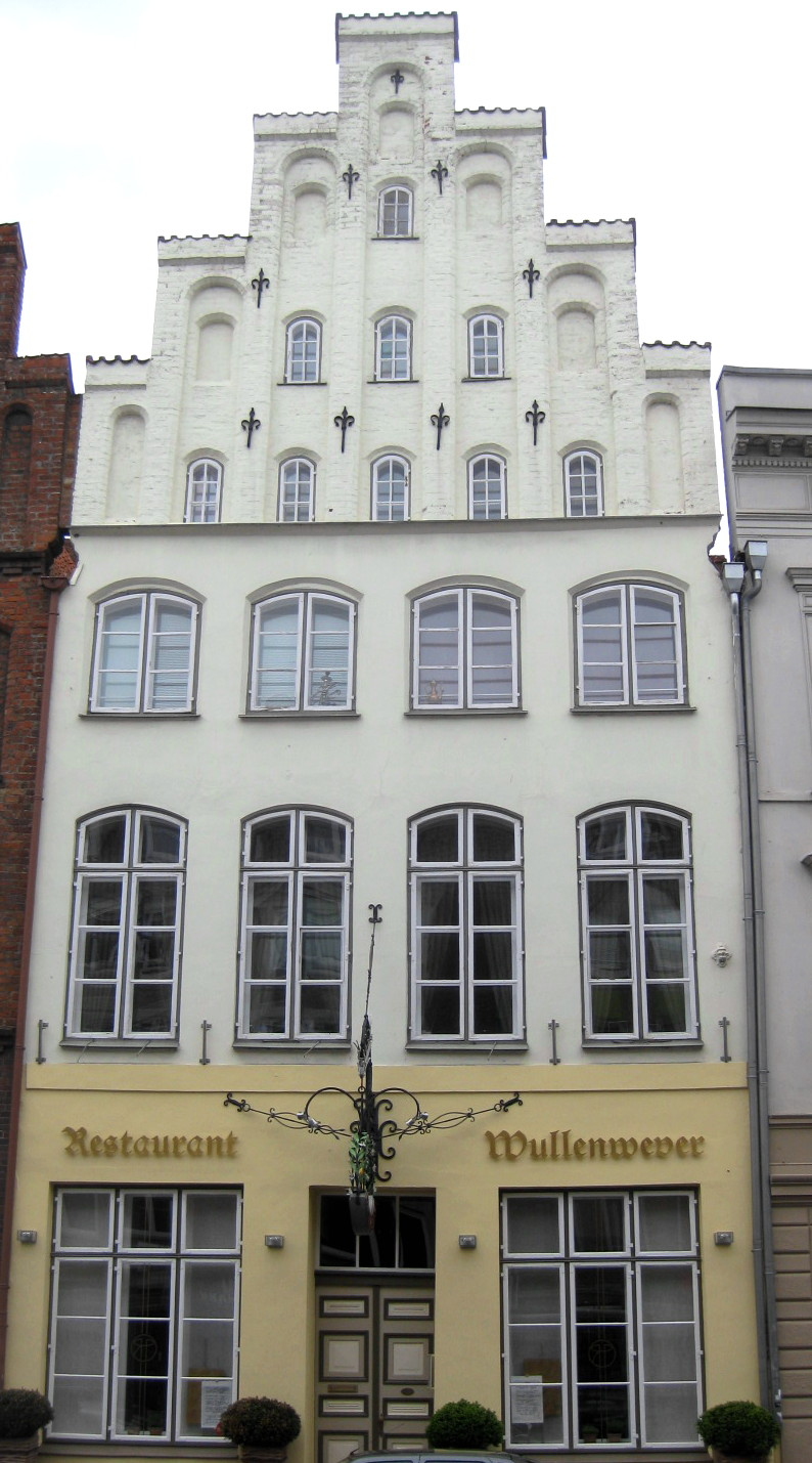 Das "Restaurant Wullenwever" in der Beckergrube in Lübeck, unter Denkmalschutz stehendes Gebäude aus dem Jahr 1585